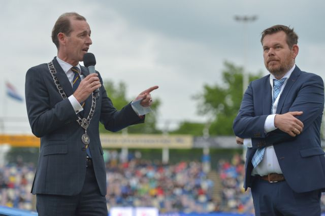 Мэр Хенгело Сандер Схелберг на церемонии открытия Мемориала Фанни Бланкерс-Кун 2016